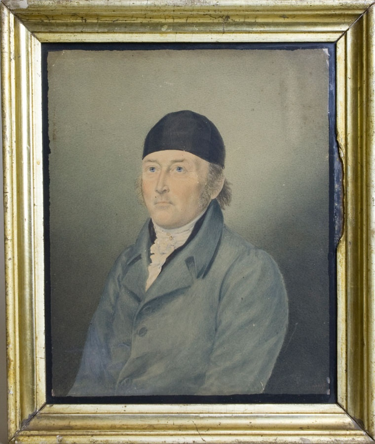 Heinrich Adolf Gustav von Thermo (1762–1835), Landesältester und Landrat im Landkreis Calau